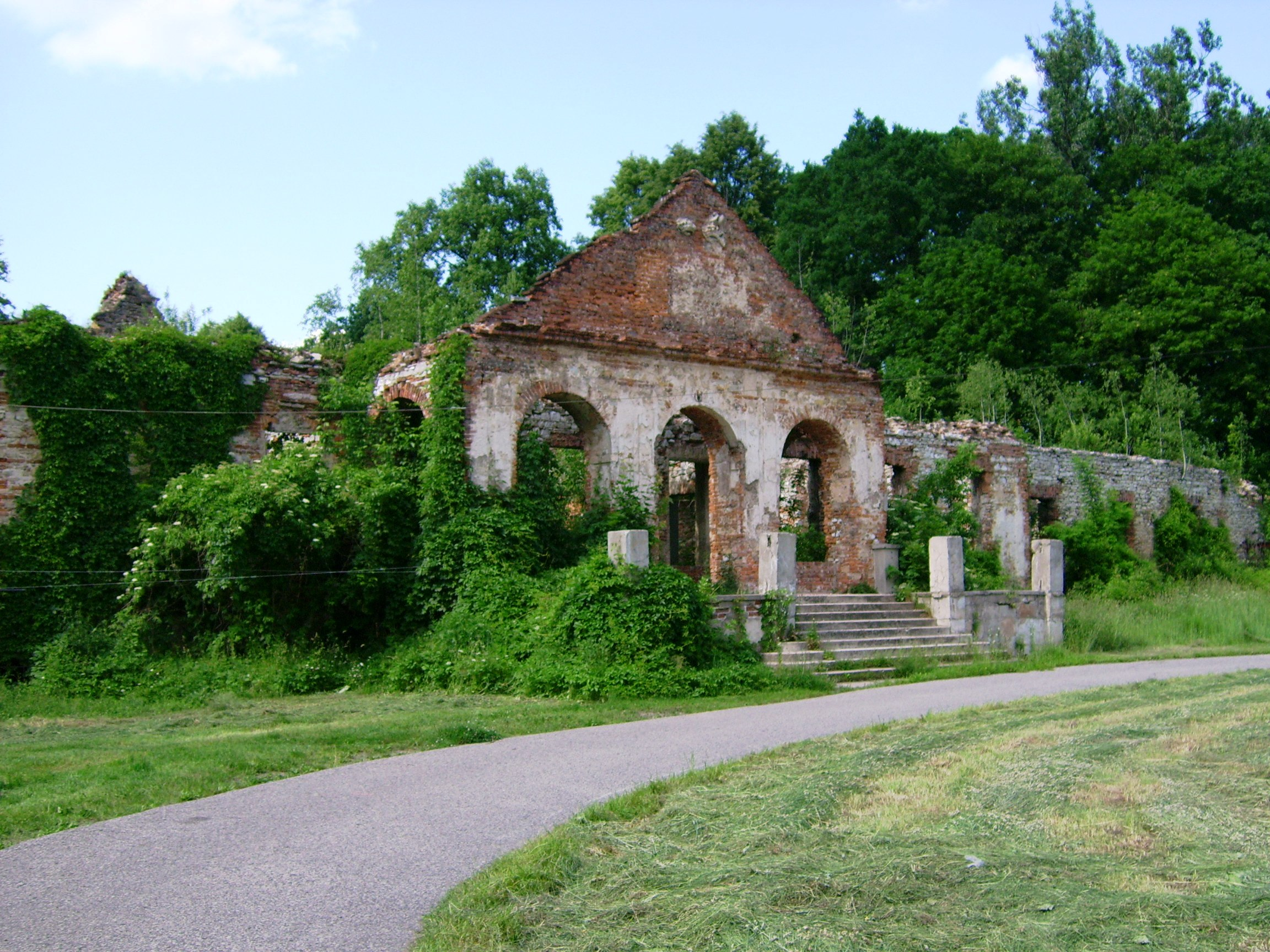 Ruiny pałacu. (zabytek nr rejestr. A/508/M)